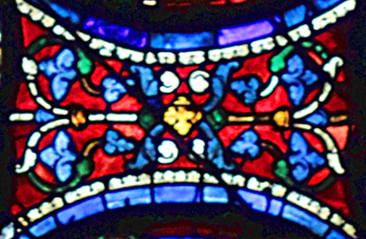 Extrait de